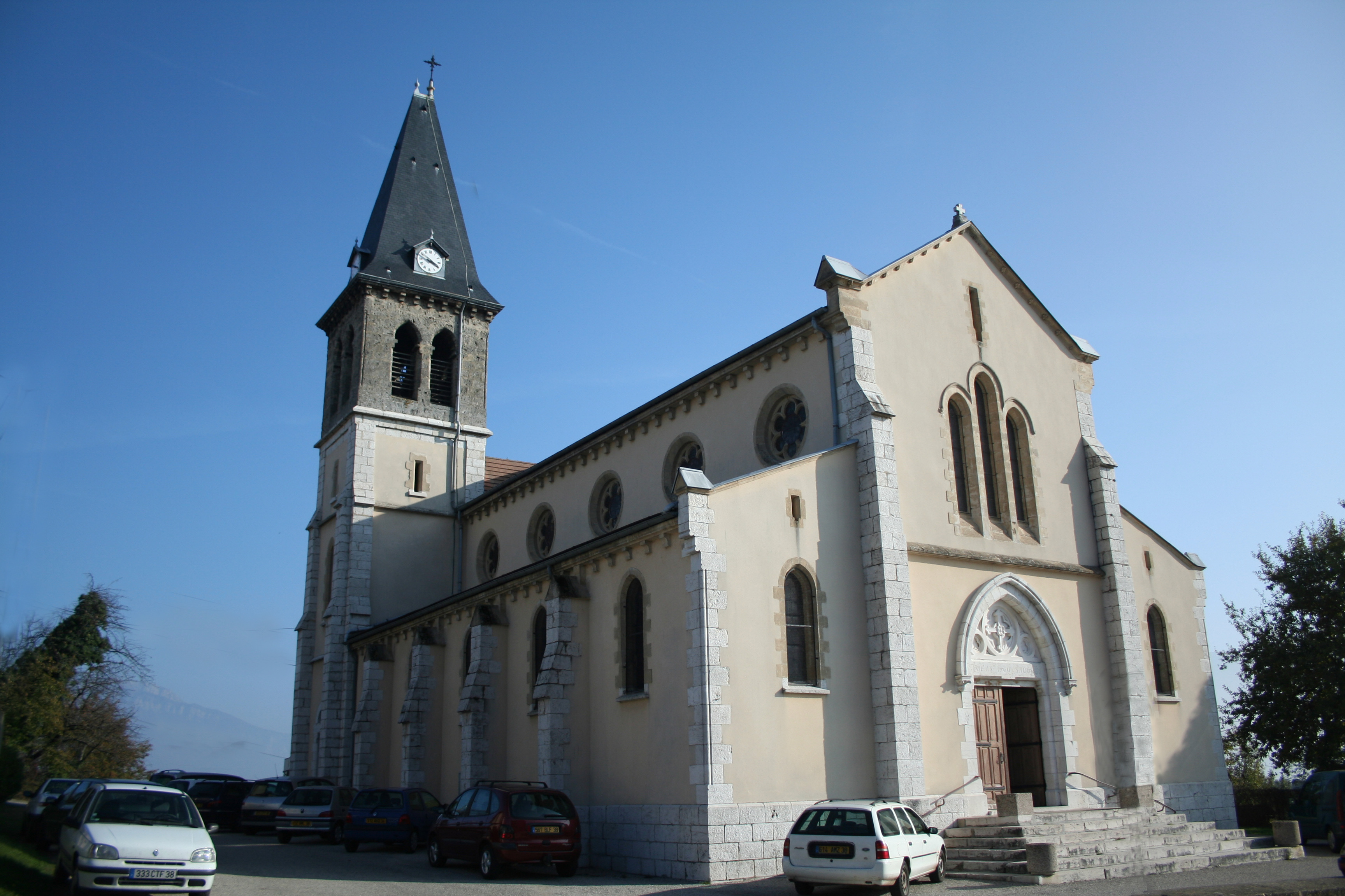 Charnècles (Isère) - église Saint-Roch et Saint-Sébastien.